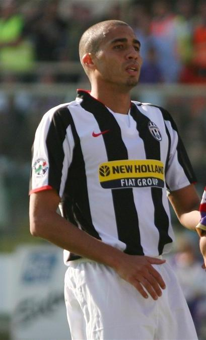 David Trézéguet